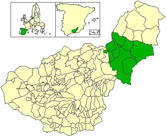 Mapa del partido judicial de Baza, en la provincia de Granada (España)